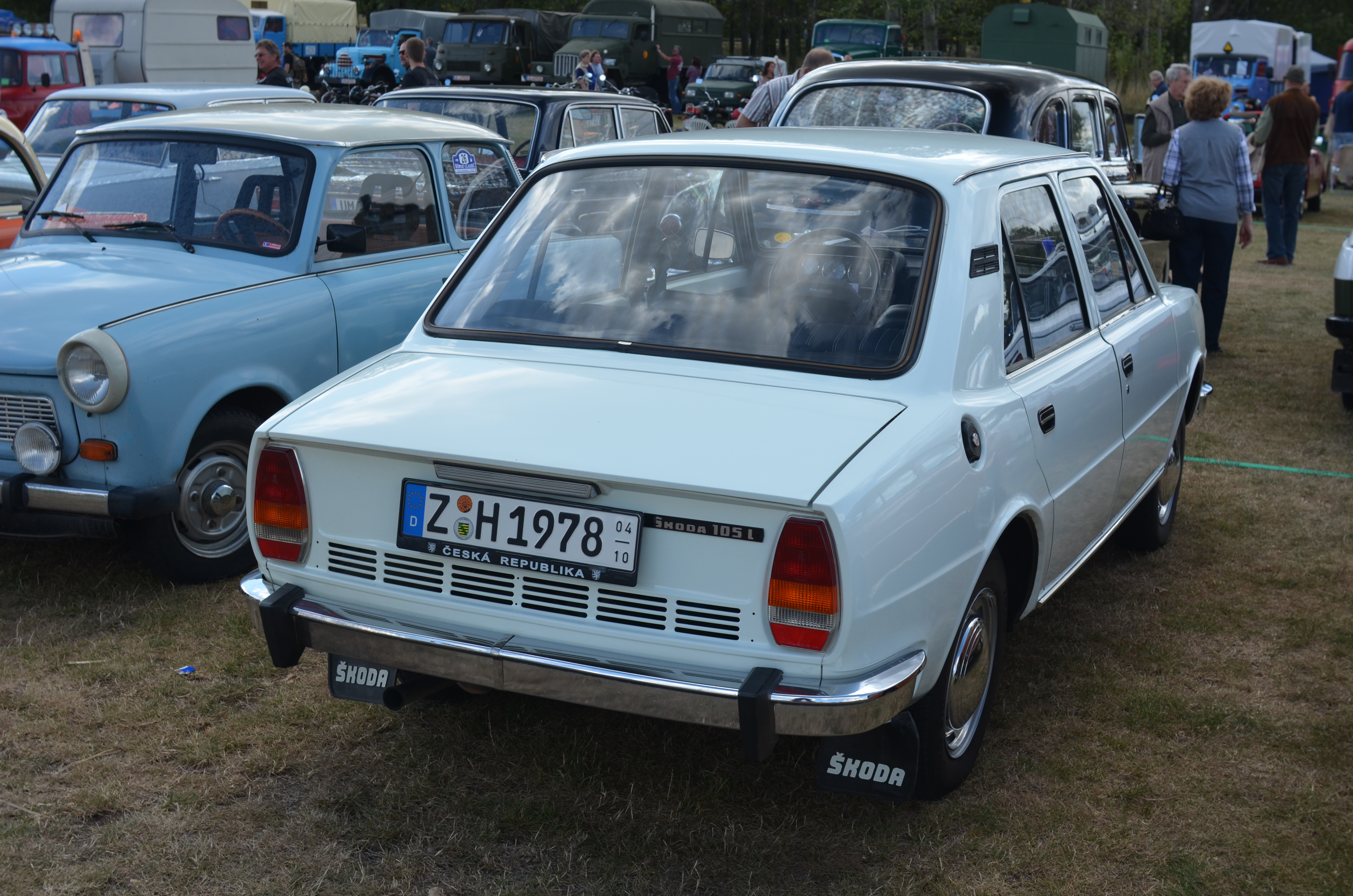 Skoda